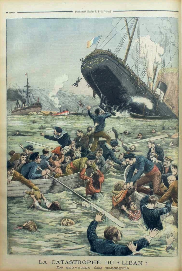 Rettung der Opfer der Schiffskollision Liban und Insulaire, Supplement illustré du Petit Journal, S. 200